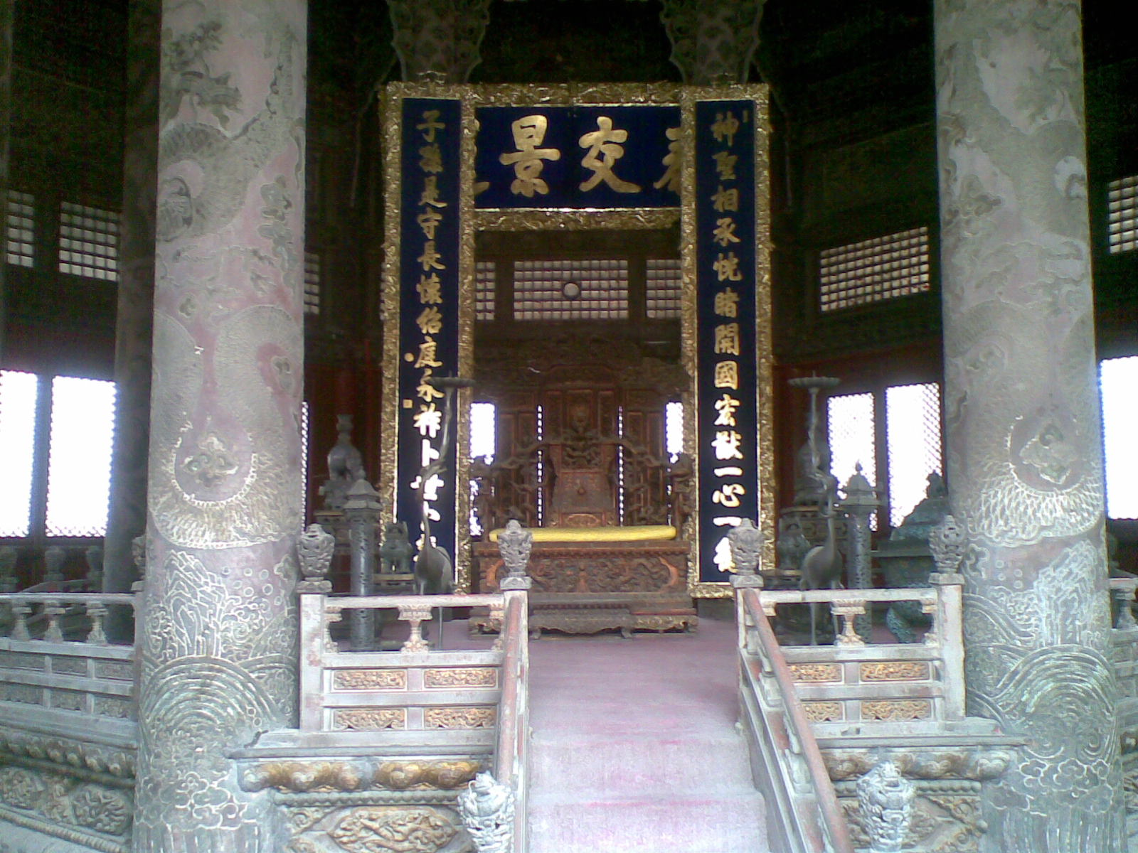 中文（中国大陆）: 沈阳故宫照片